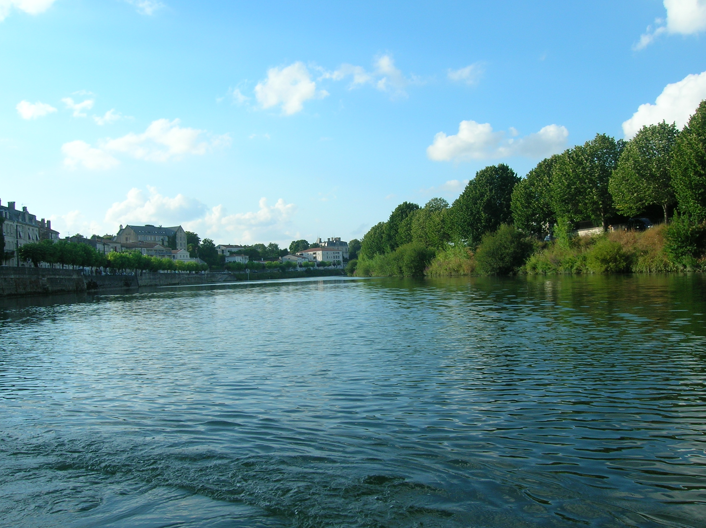 La Charente à Saintes